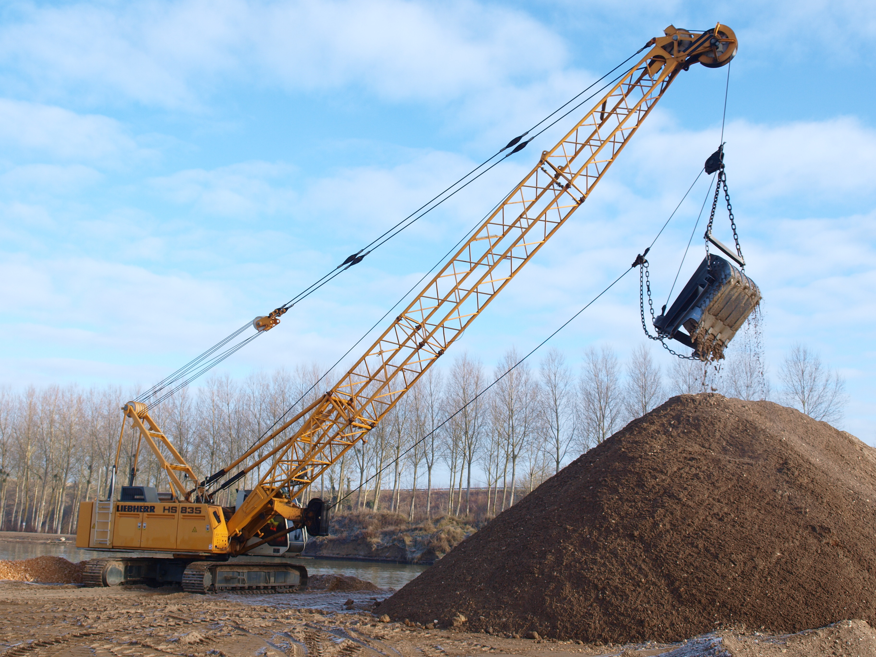 Dragline Liebherr HS 835, en extraction de tout-venant de sablière, en eau.